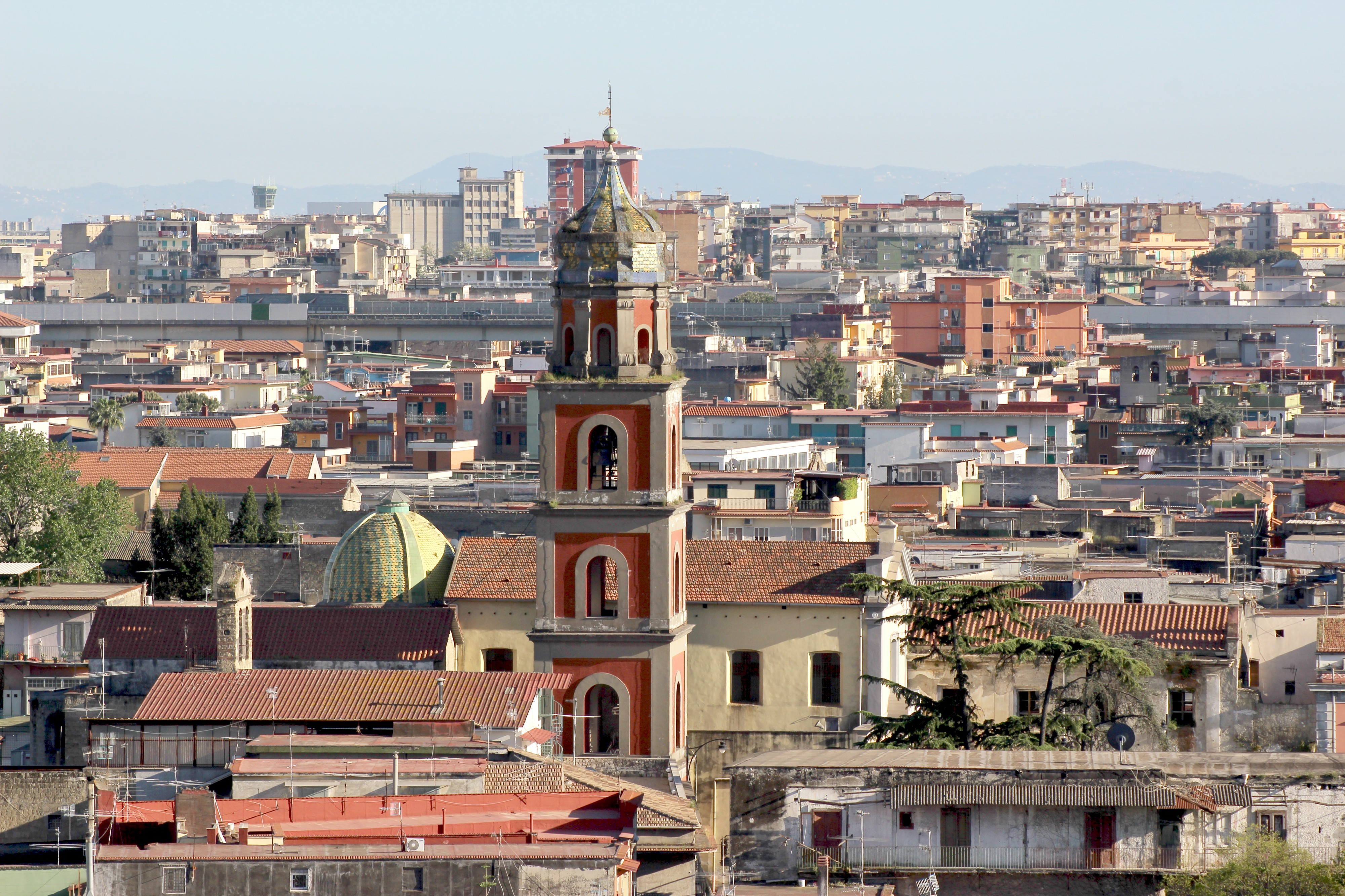 Una veduta della città di Arzano nel 2016